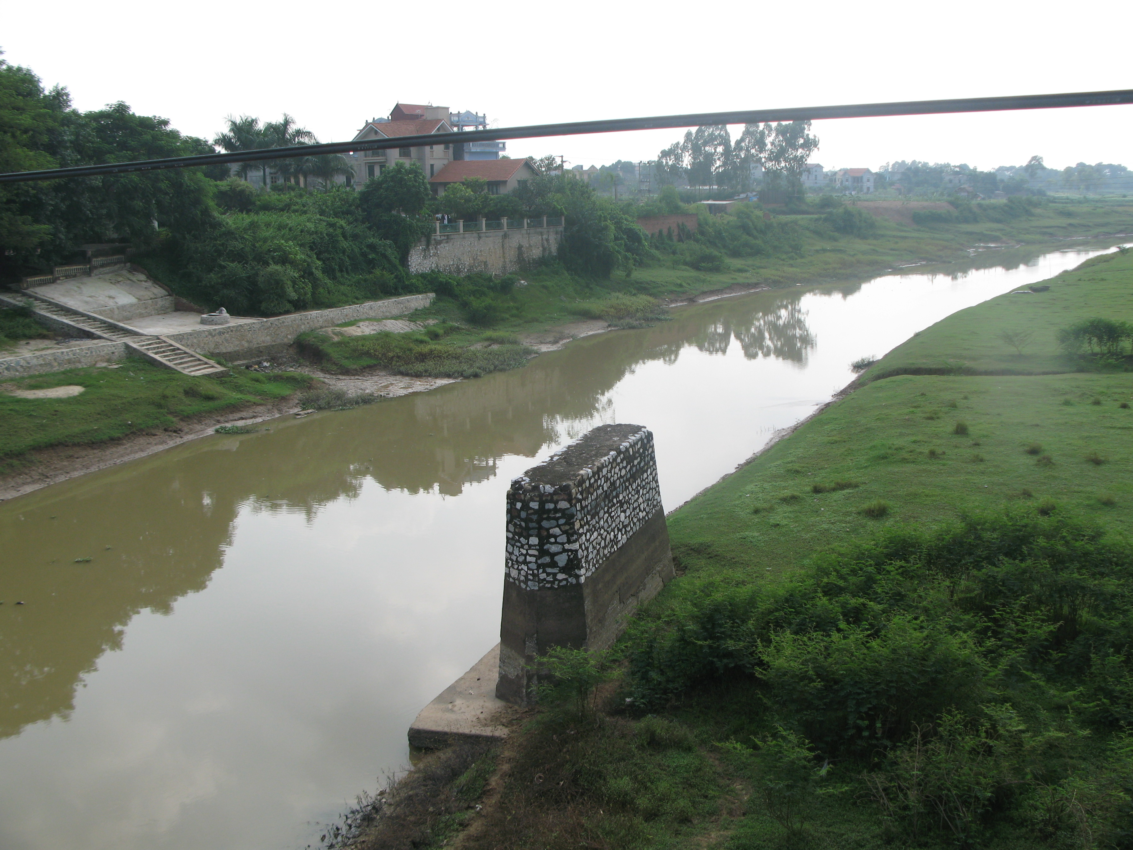 Sông Cà Lồ - một nhánh của sông Cầu. Ảnh chụp từ trên cầu Phù Lỗ ngược về phía thượng nguồn dòng sông, về phía Tây. Sông Cà Lồ đổ vào sông Cầu ở Ngã Ba Xà (nơi tiếp giáp ba huyện là Hiệp Hòa, Yên Phong, Sóc Sơn, ba huyện này thuộc ba tỉnh khác nhau)